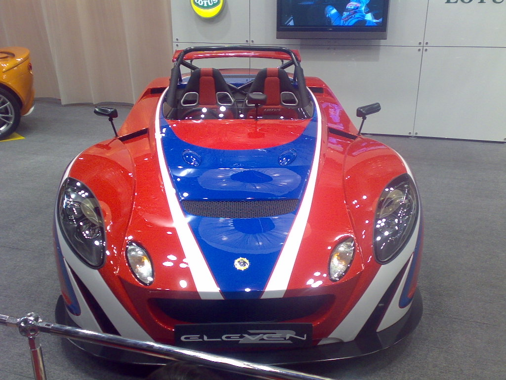 LOTUS 255PS・24.7kg-m Woooow2-Eleven